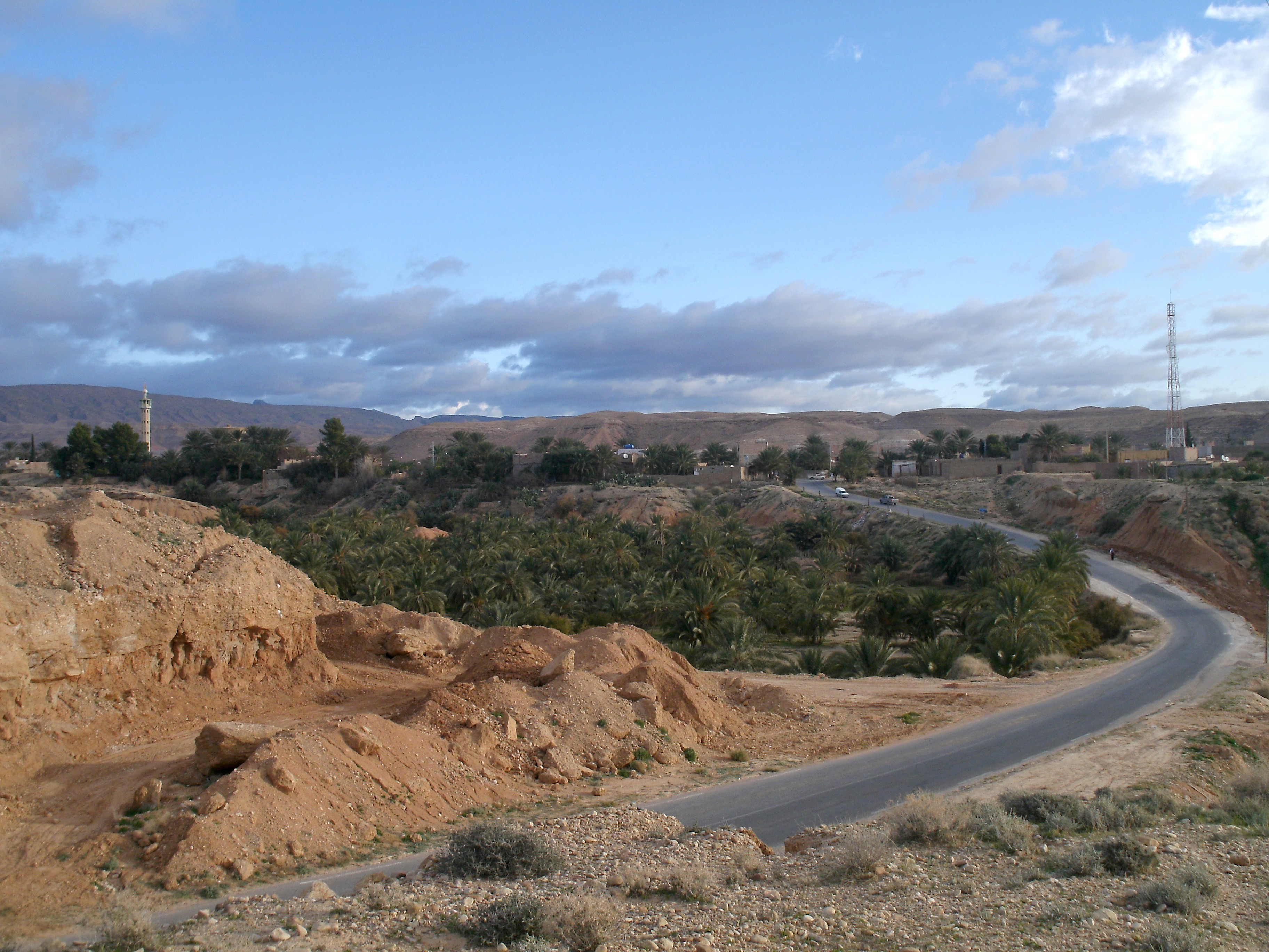 Baniane